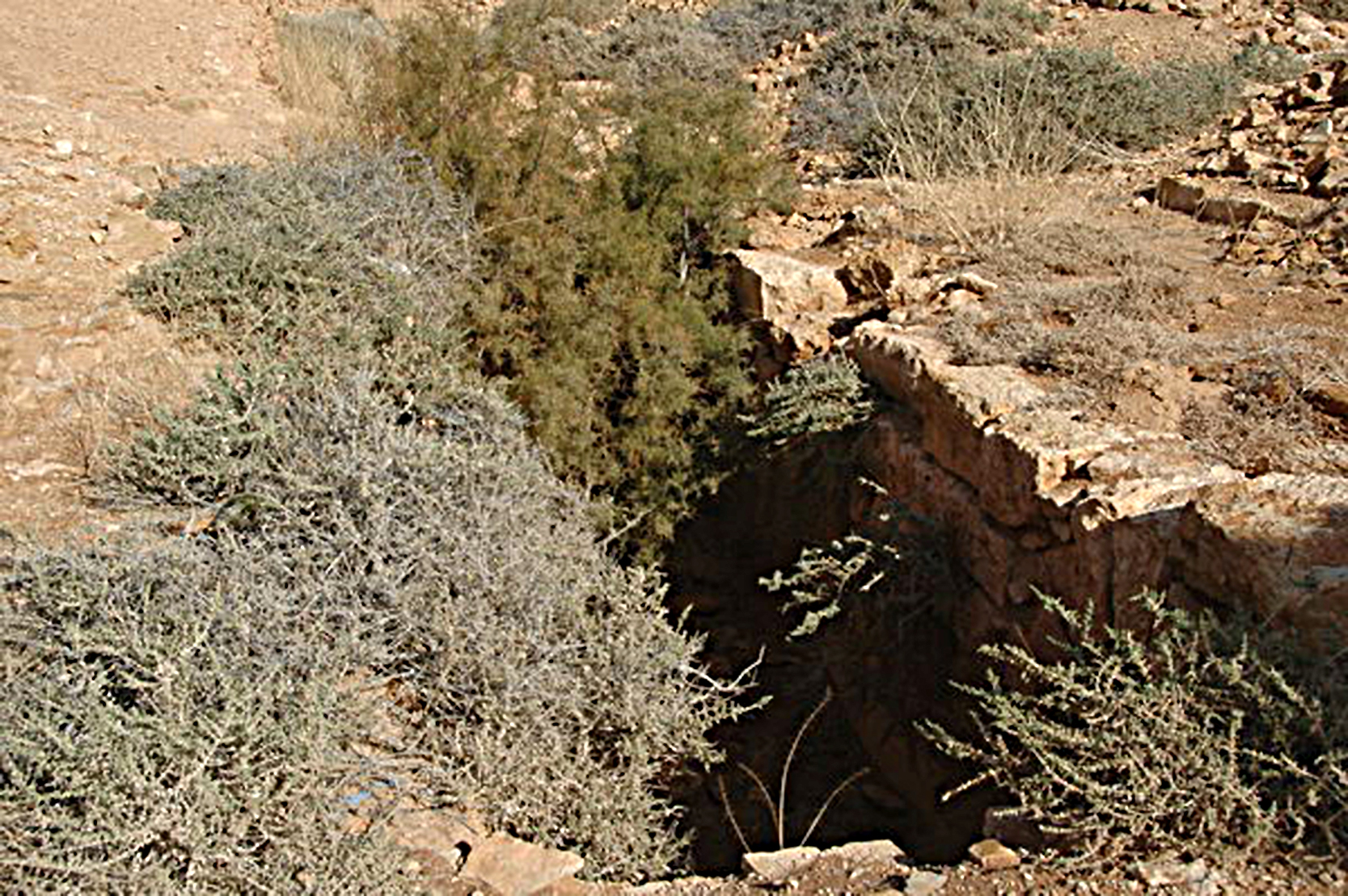 Kastell Gheriat el-Garbia - Die außerhalb der Nordecke des Kastells errichtete, 4,50 × 20,8 Meter große, einst überwölbte Doppelkammerzisterne, die ein Absetzbecken sowie einen Überlauf besaß. Das Photo zeigt den Zustand 2006 aus westlicher Richtung - vor dem Beginn der Ausgrabungen am Kastell in den Jahren 2009/2010.